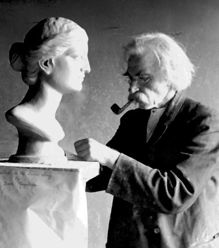 Billedhuggeren Christen Daae Magelsen. Christiania-originaler: portrett, mann, billedhugger, piperøyking, kvinnebyste.